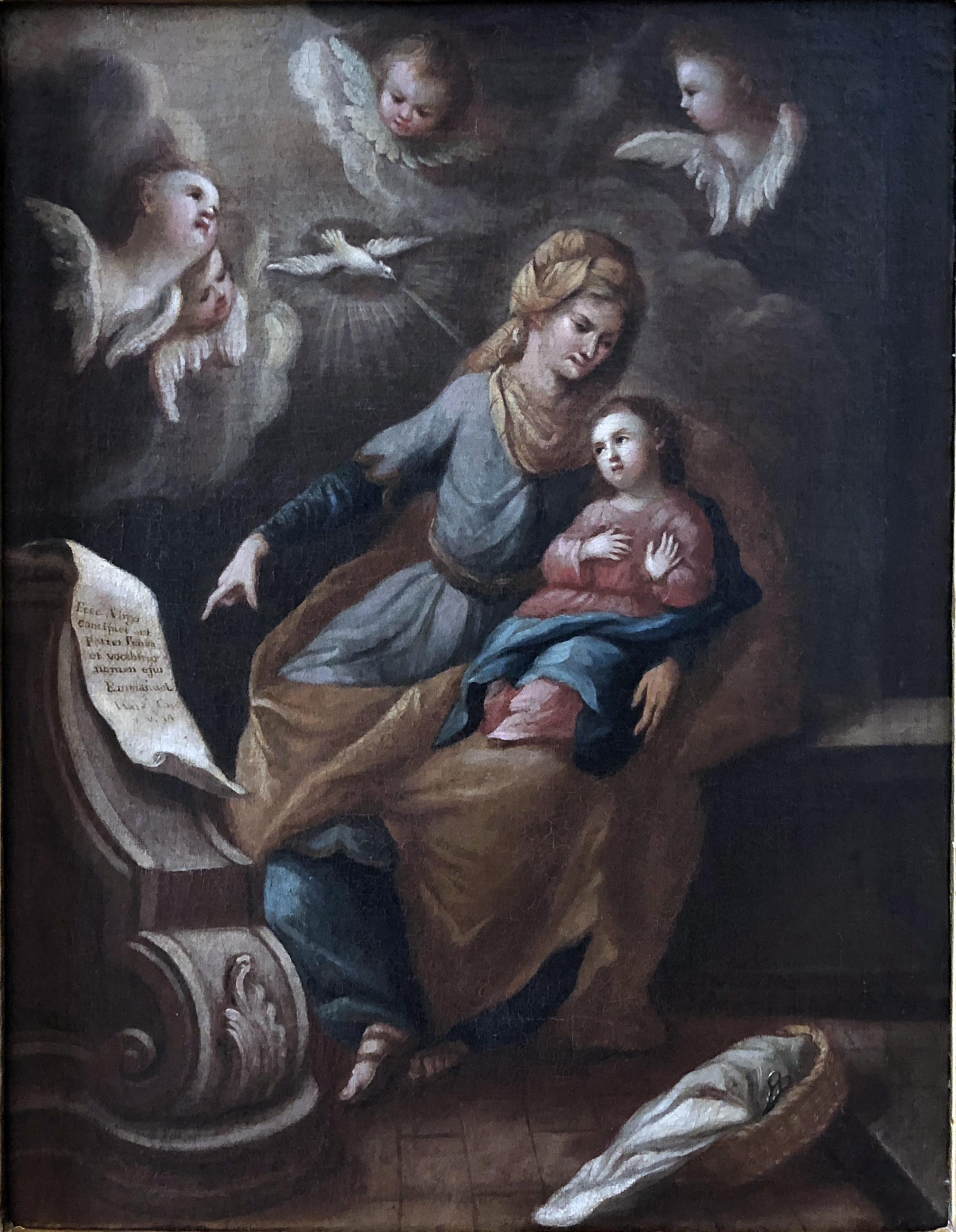 Santa Ana y la Virgen Niña Siglo XVIII Francisco Eduardo Tresguerras Colección Museo Nacional de Arte Ciudad de México